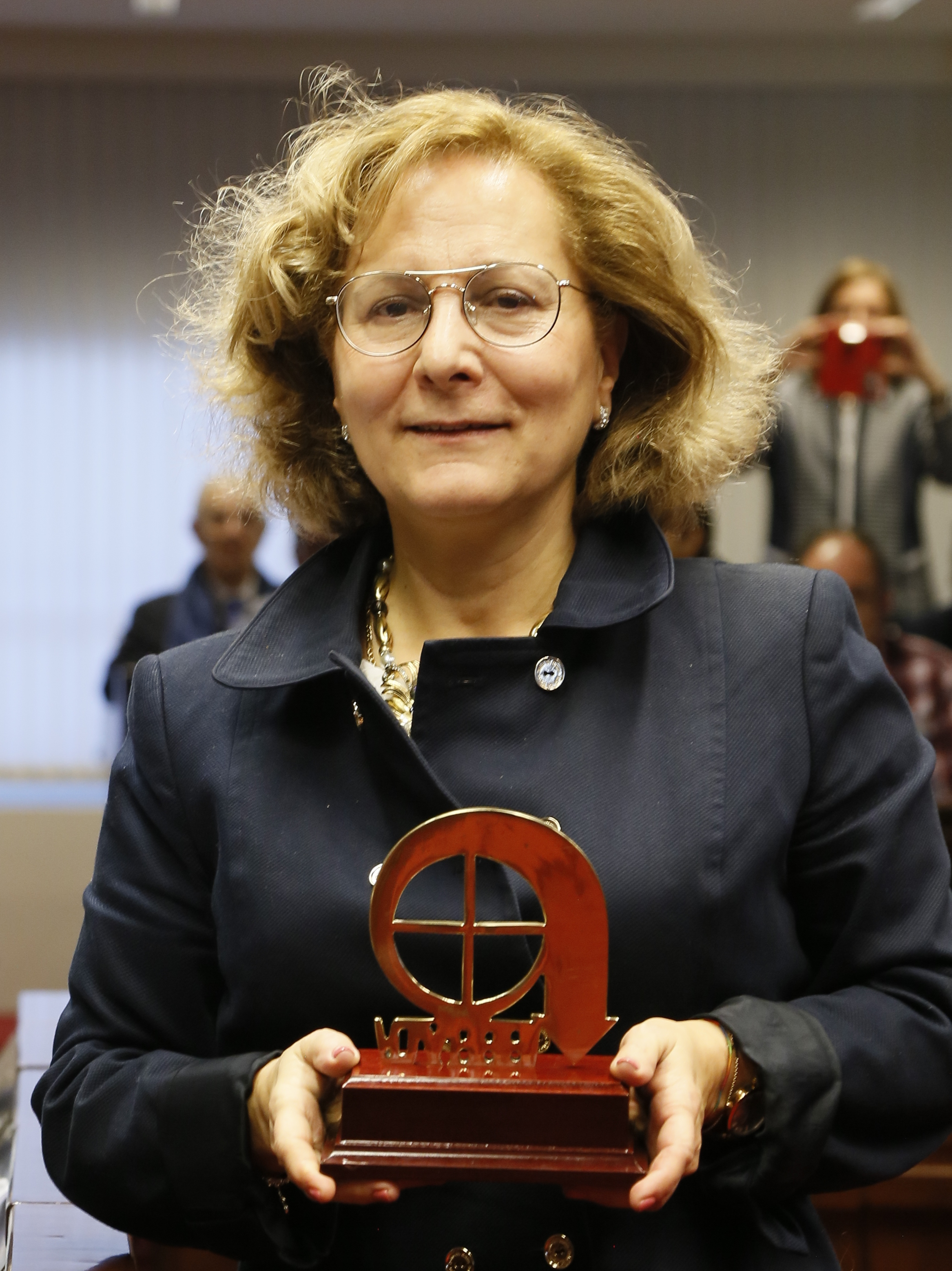 Entrega de los Premios ¡Bravo! 2018